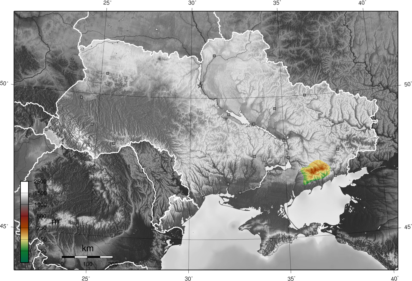 Pieazovas augstienes izvietojuma karte